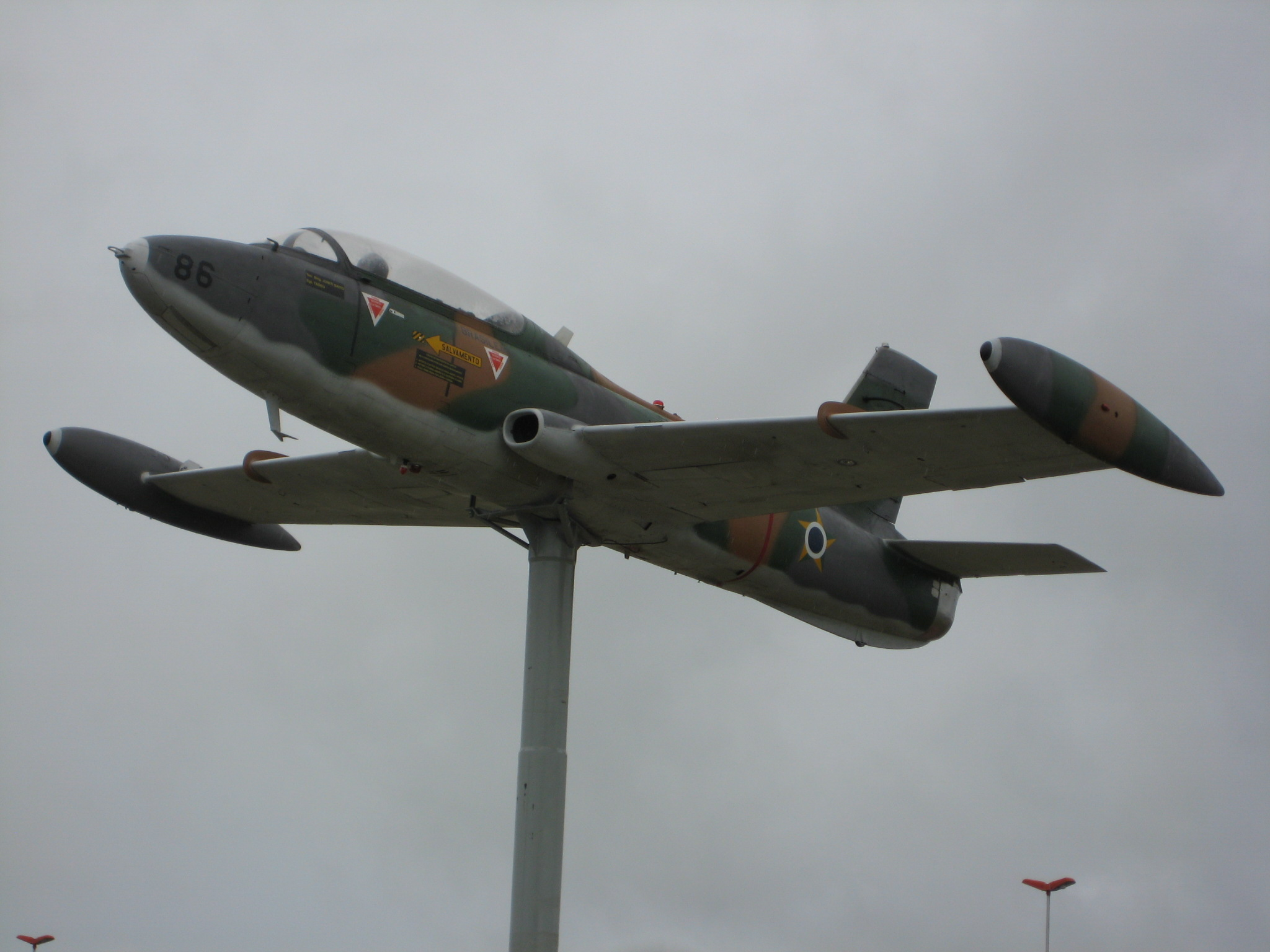 Xavante em Pompéia 5